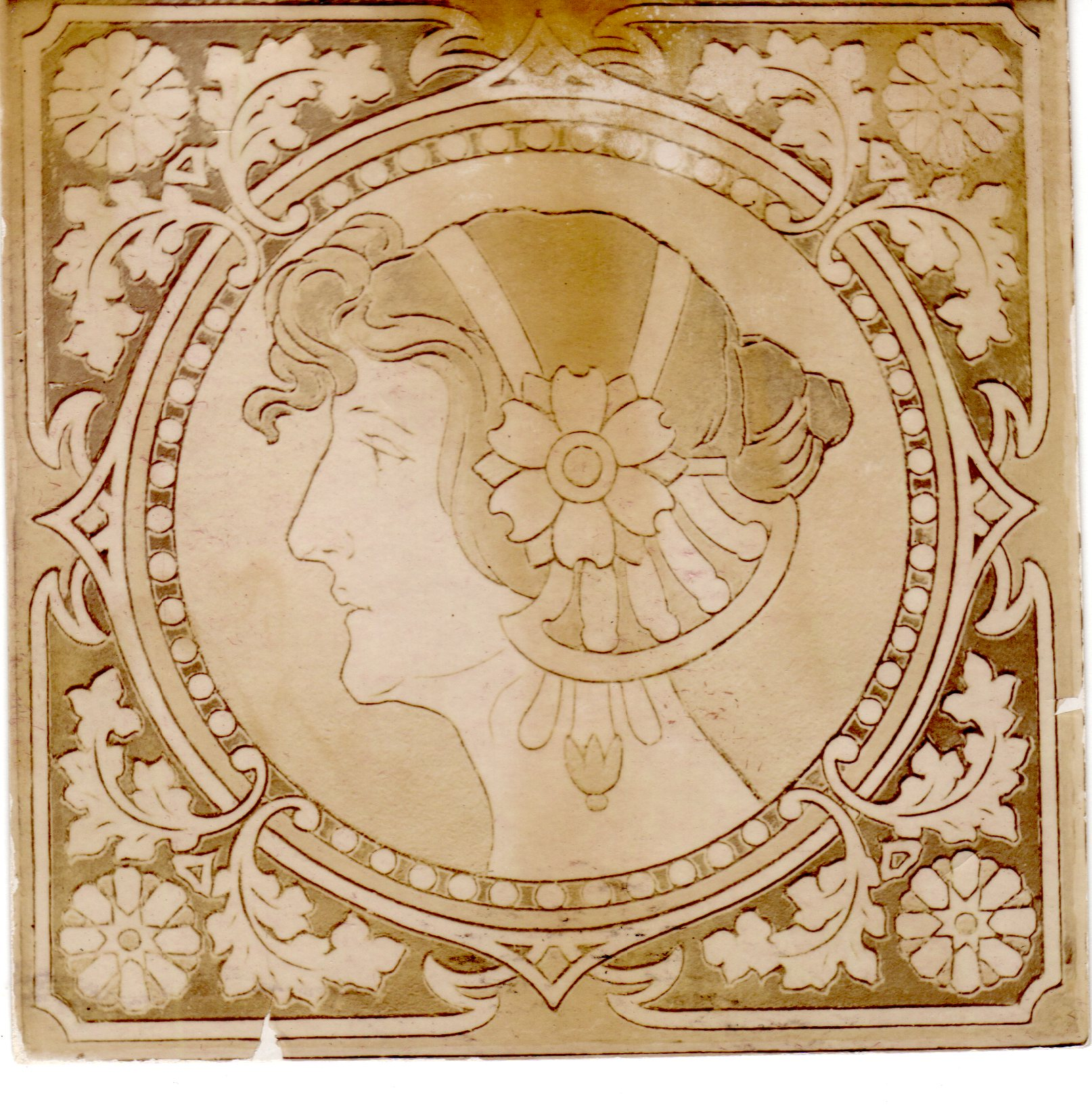 Photo par Gabriel van Dievoet (1875-1934) d'un sgraffito semblable à ceux qu'il a realisés en 1901 rue du Basson 26 à Marcinelle (Charleroi) Belgique.